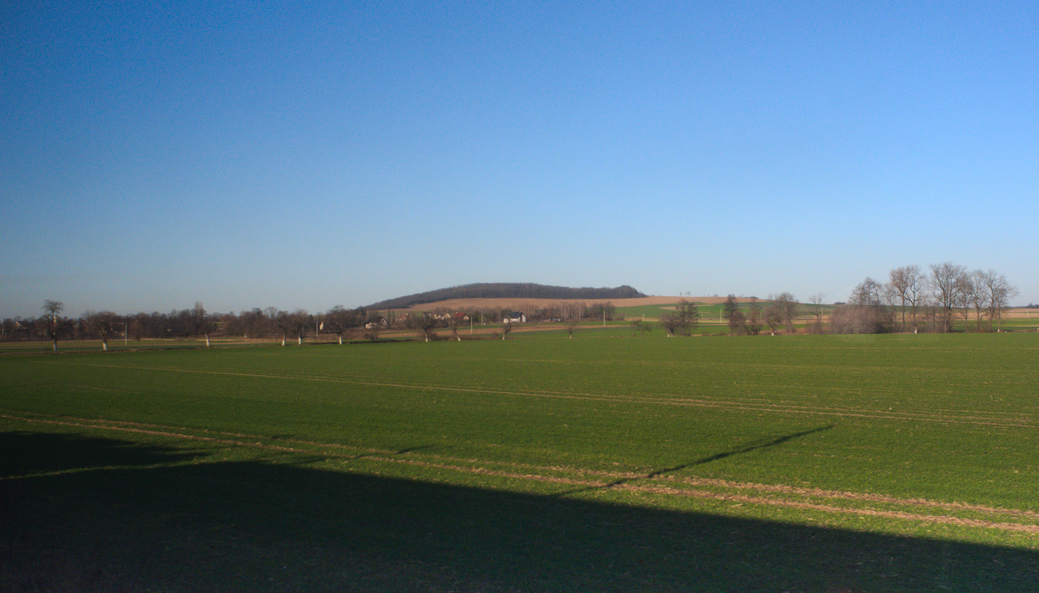 Pyszczyńska Góra, z lewej kościół w Imbramowicach, widok z południa, z okna pociągu do Wrocławia (przybliżone położenie: na odcinku pomiędzy Mietkowem a Imbramowicami)